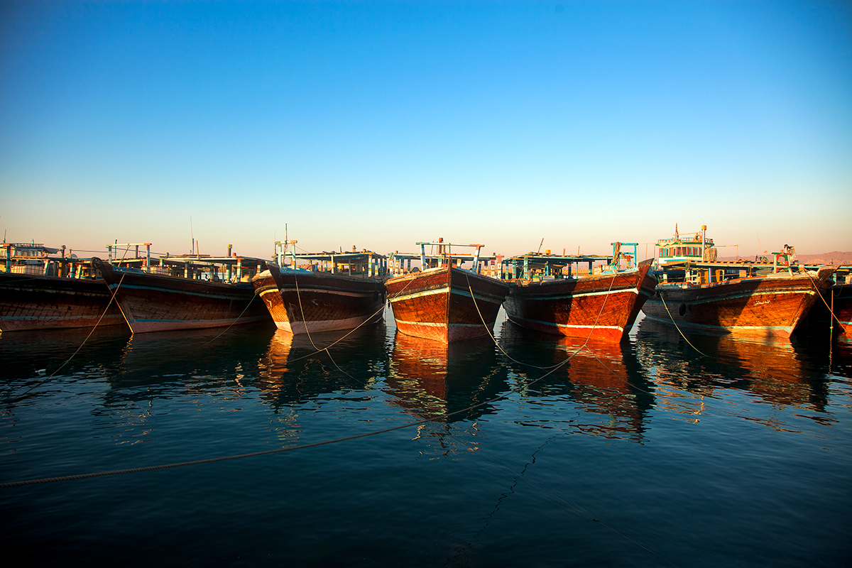 بندر کوهستک